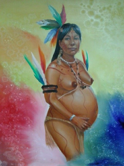 Título: Mujer Indígena Autor: Edgar Guerrero.